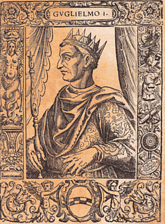 == Licenza d'uso: ==